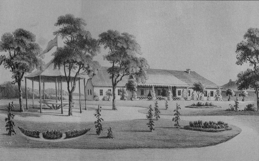 Гравюра з «Album widoków Wołynia».